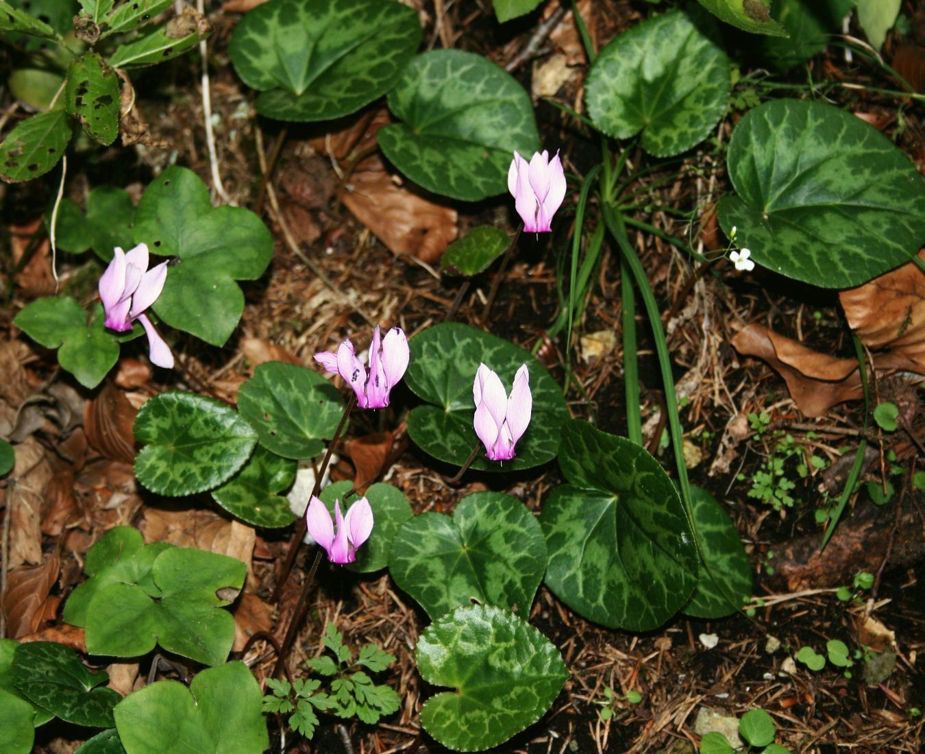 Wildes Alpenveilchen (Cyclamen purpurascens), Primelgewächse (Primulaceae), Myrsinoideae – Österreich/Austria/Autriche: Steiermark, Grazer Bergland, Weizklamm 6–7 km NNW Weiz